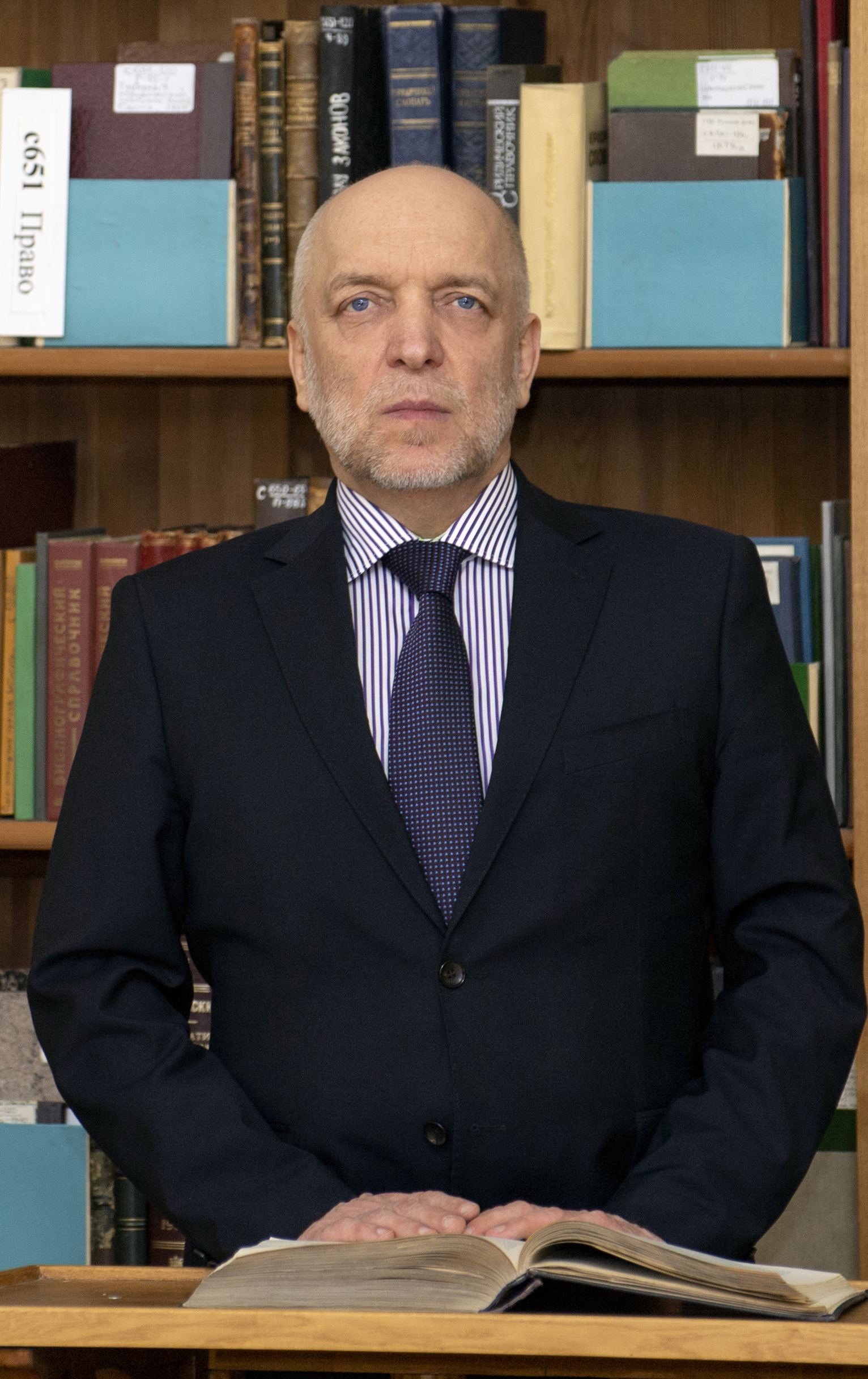 Вершинин Александр Павлович